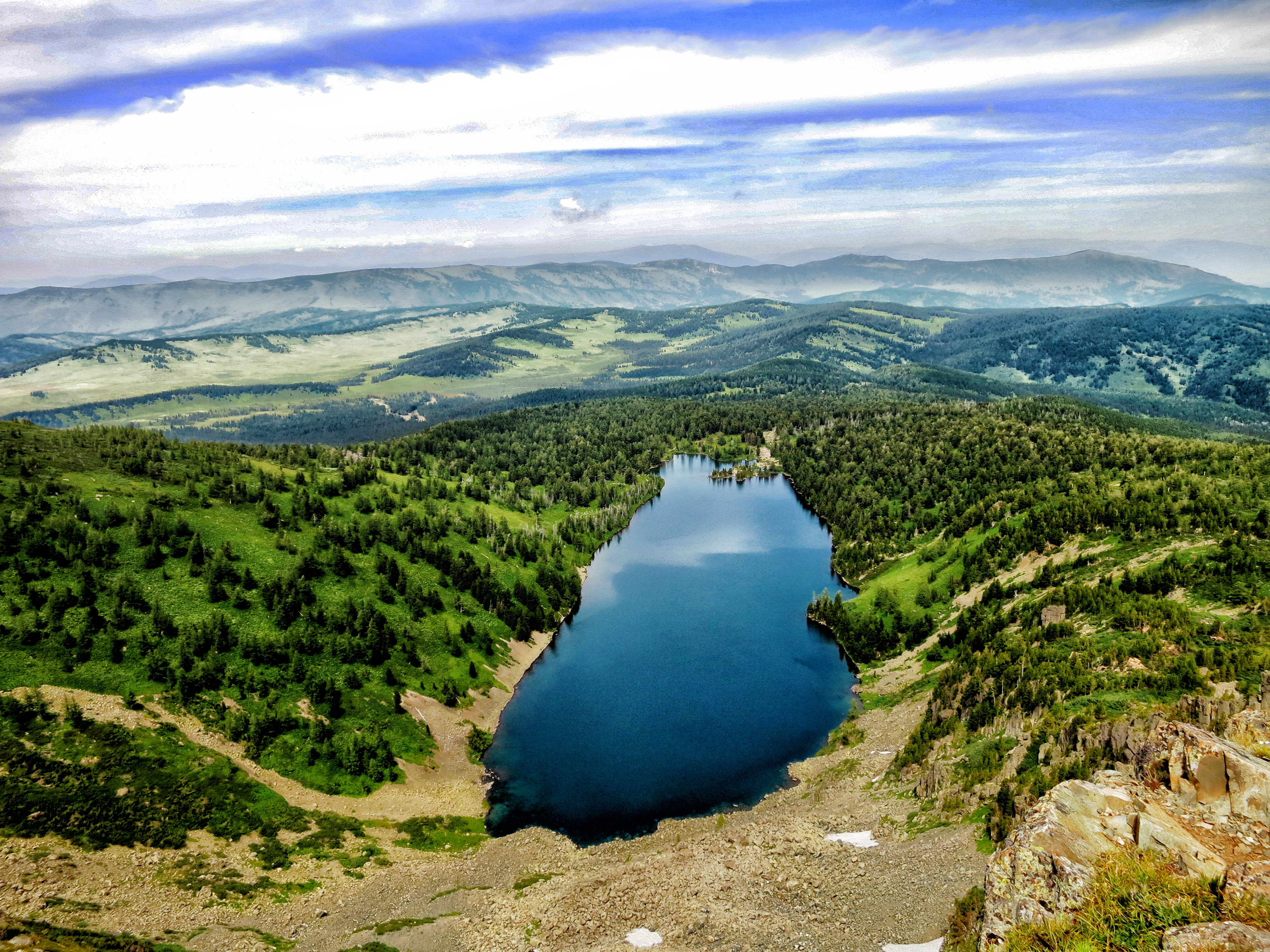 Катунский заповедник: Усть-Коксинский район, Алтай This image is related to the protected area of Russia number 0400042